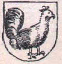 Herb z jednej ze stron publikacji. Przedstawia herb Kur Biały.